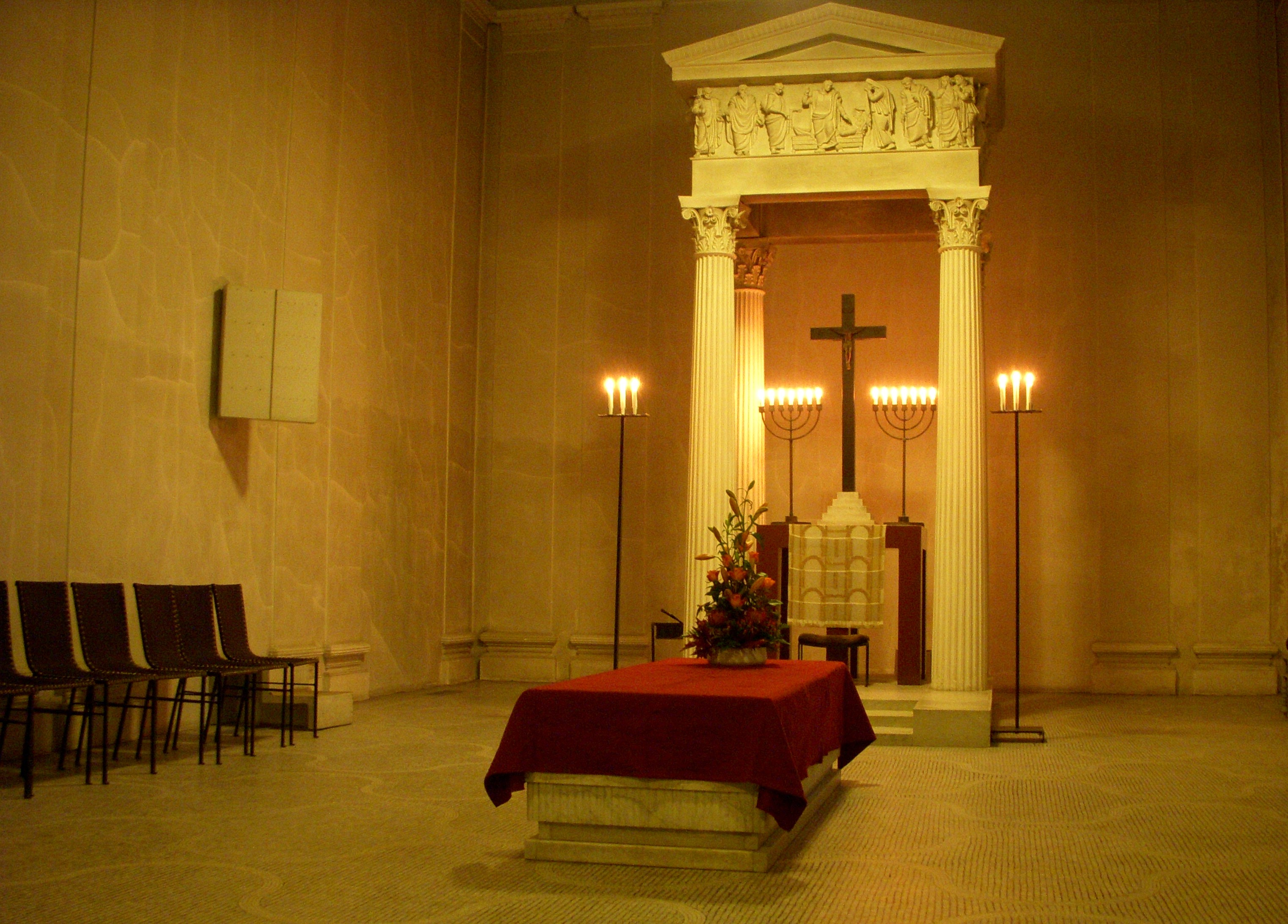 Skogskyrkogården i Stockholm, Uppståndelsekapellet